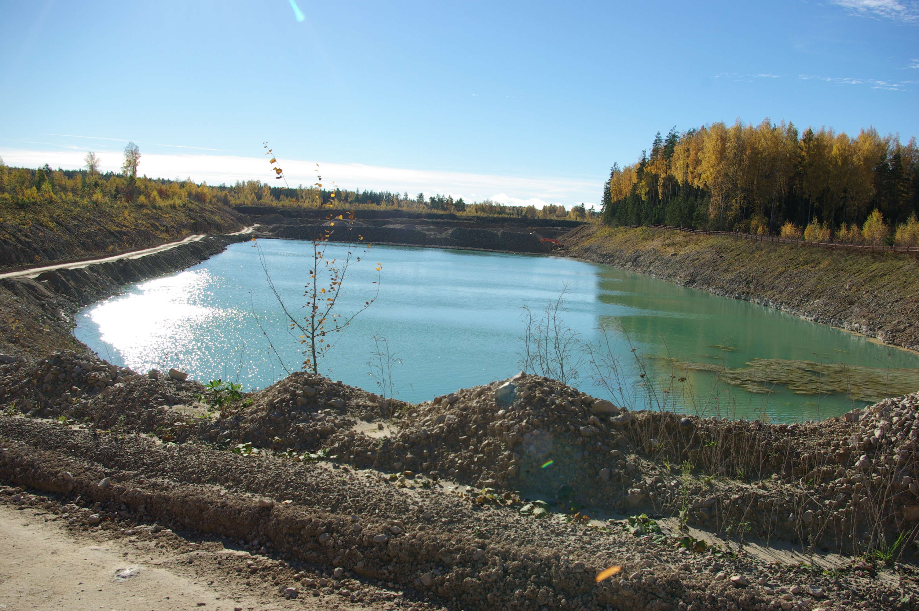 Dolokivi kaevandus Meremäe vallas